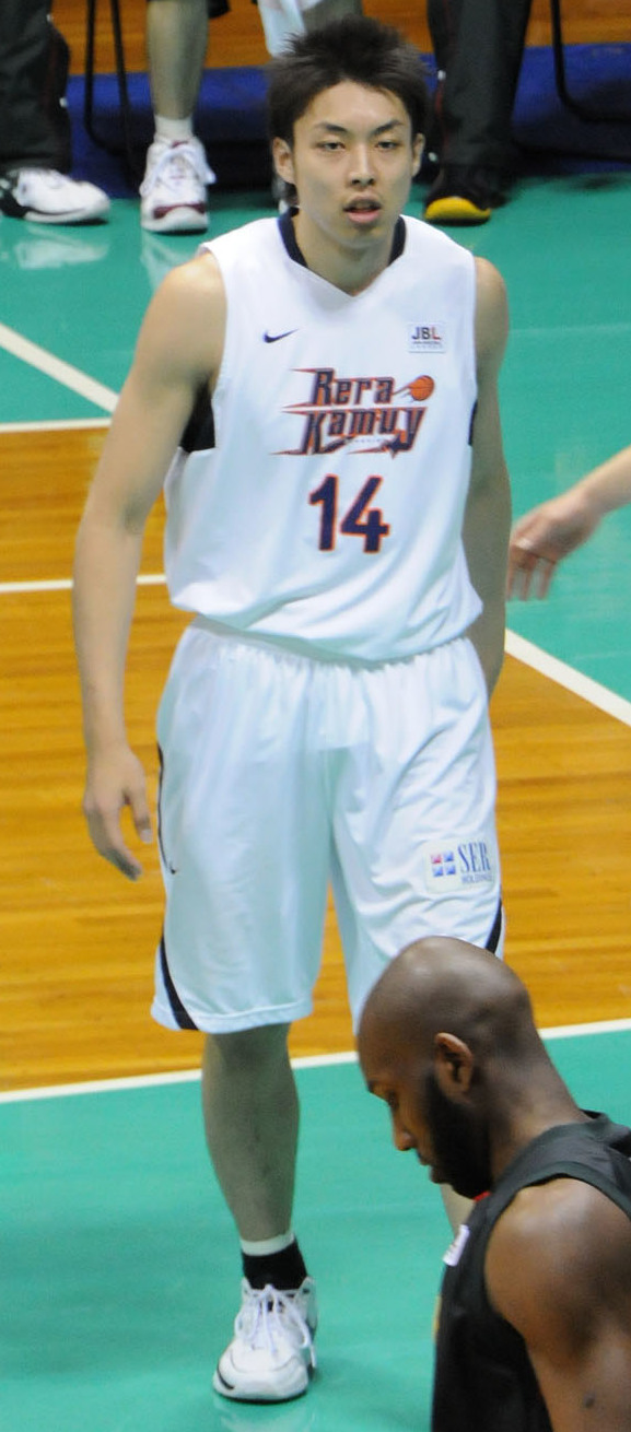 レラカムイ北海道の加藤真選手。代々木第二体育館で。